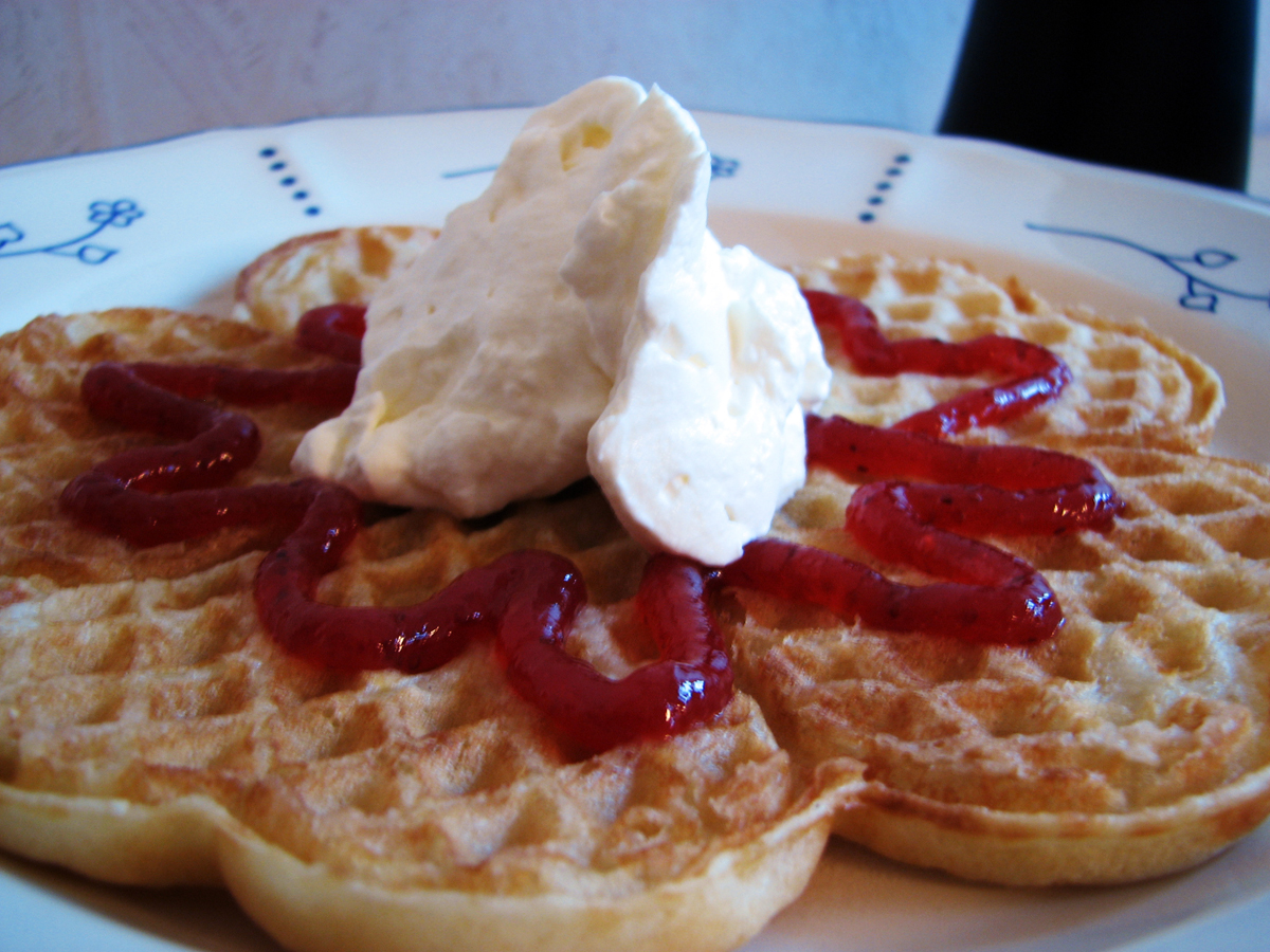 Våffla med gräddklick